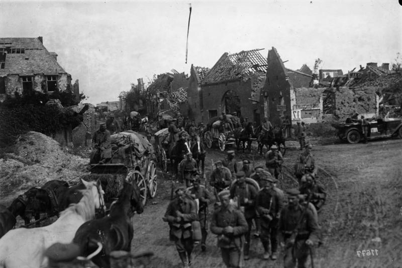 Deutsche Truppen auf dem Rückmarsch von Bapaume / Sommer, August/September 1918